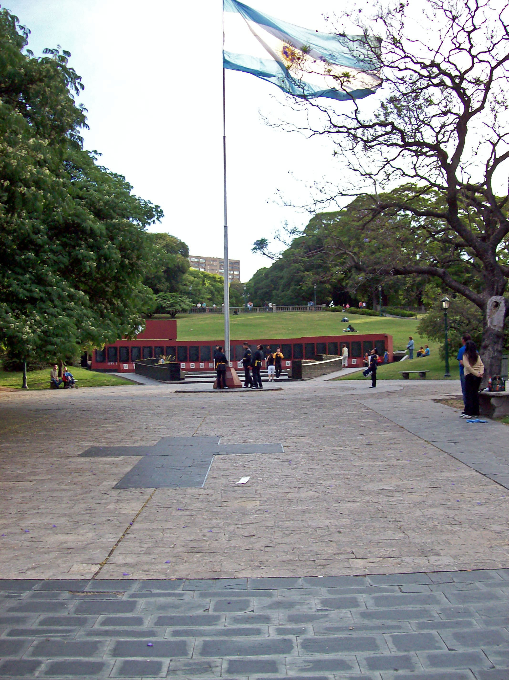 Monumento a los caídos en Malvinas, Buenos Aires